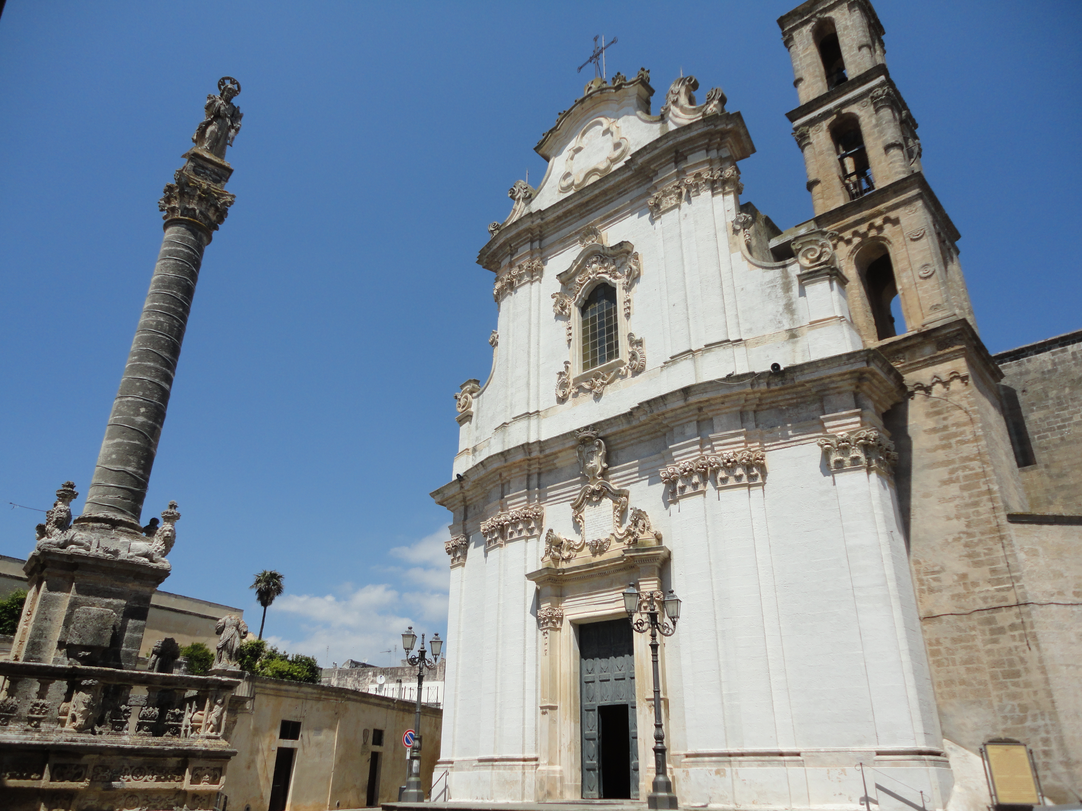 Chiesa e colonna Sant'Andrea di Presicce